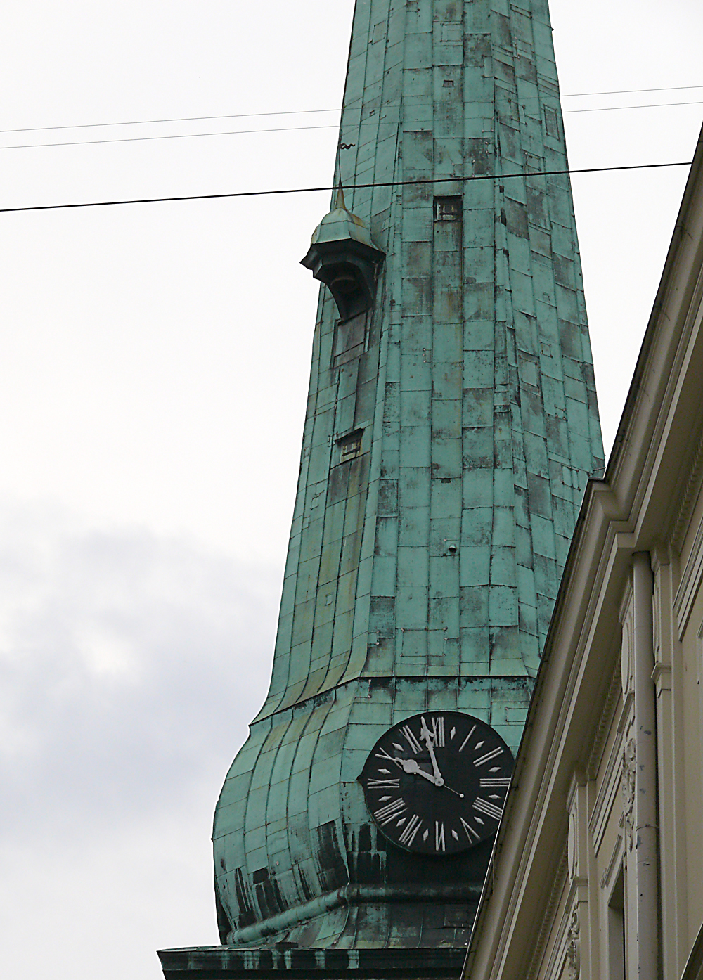 Rīgas sv. Jēkaba katedrāles tornis ar ārējā zvana vietu.